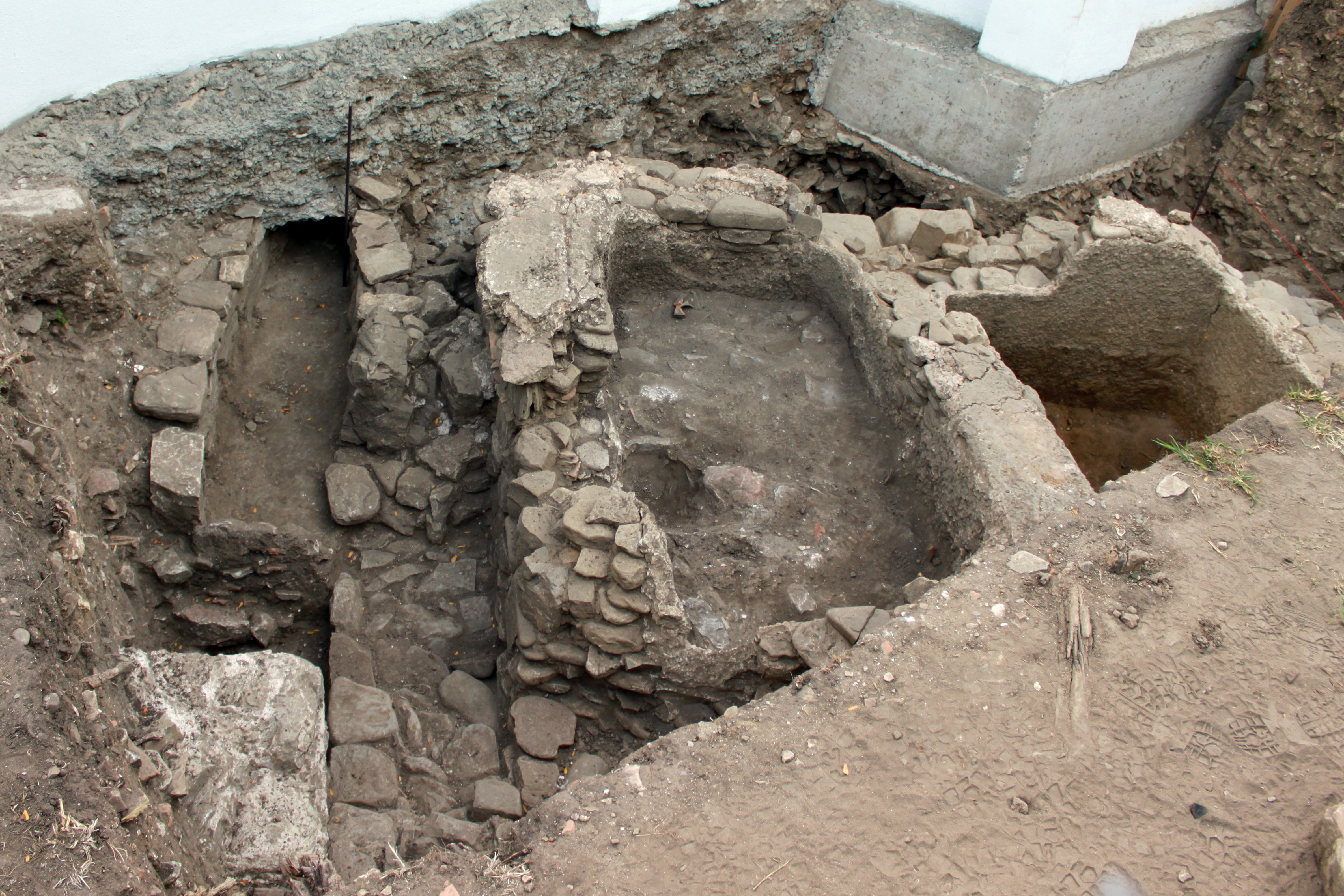 Piletas de salazón correspondientes al complejo de fabricación de garum de Iulia Traducta, de entre los siglos I y V. Estos restos fueron localizados en mayo de 2015 durante las obras de reparación del muro perimetral del Parque de las Acacias/Parque Smith de la Villa Vieja de Algeciras, Andalucía, España.